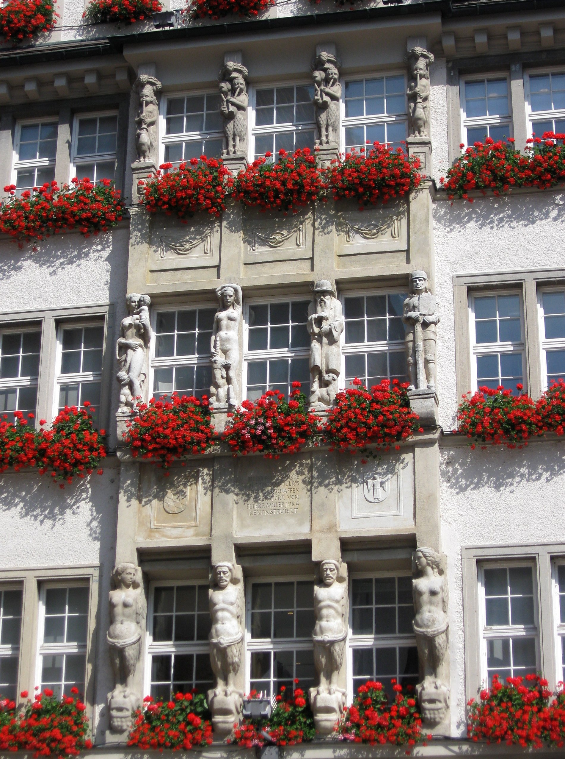 Kaufingerstraße 28; Geschäftshaus Zum Schönen Turm, jetzt Hirmer-Haus, stattlicher historisierender Eckbau, bez. 1914, von Eugen Hönig und Karl Söldner mit Bildhauerarbeiten von Julius Seidler; an der Ecke Modell des ehemals hier stehenden Schönen Turms.